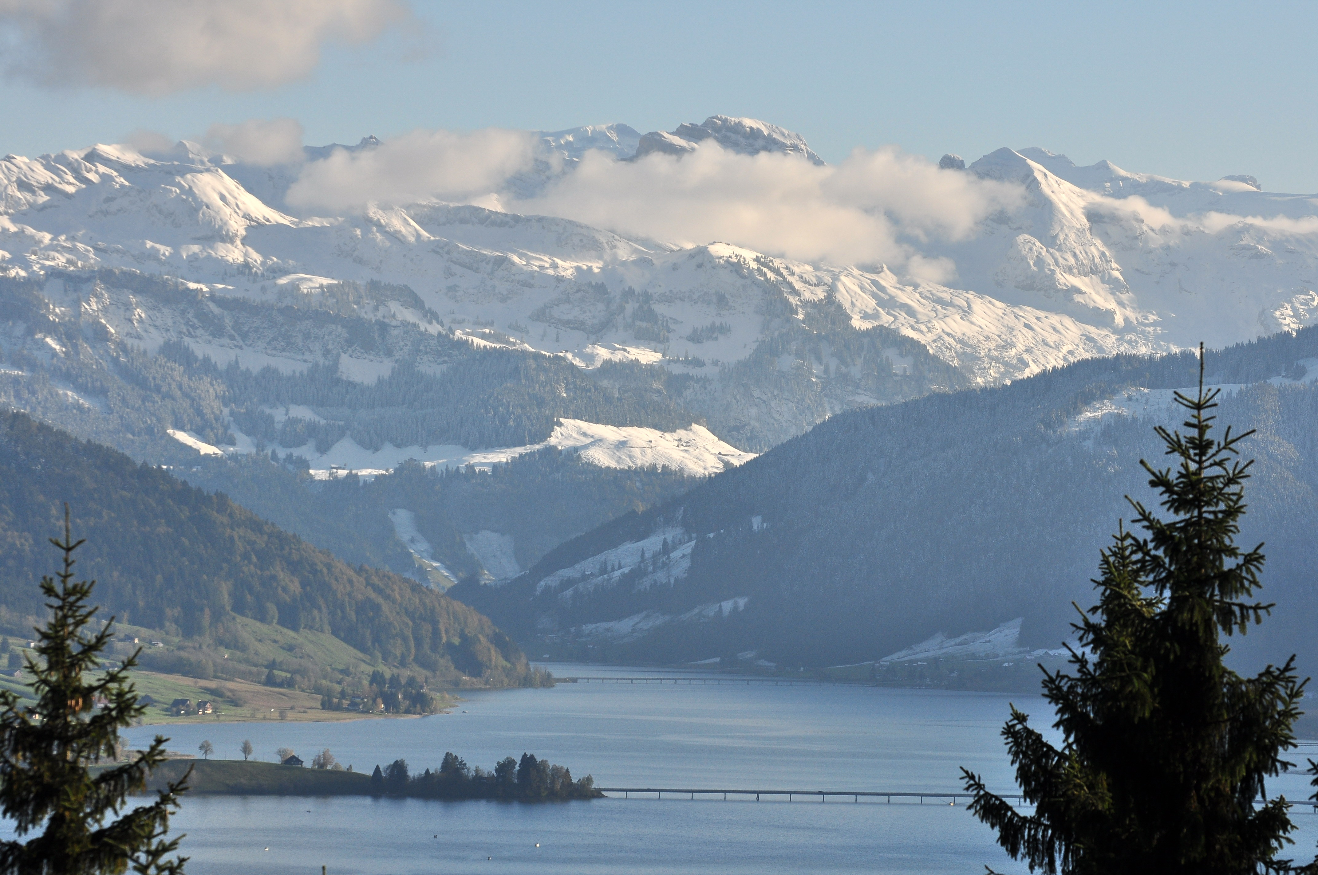 Sihlsee and Willerzell as seen from Etzel Kulm in Switzerland